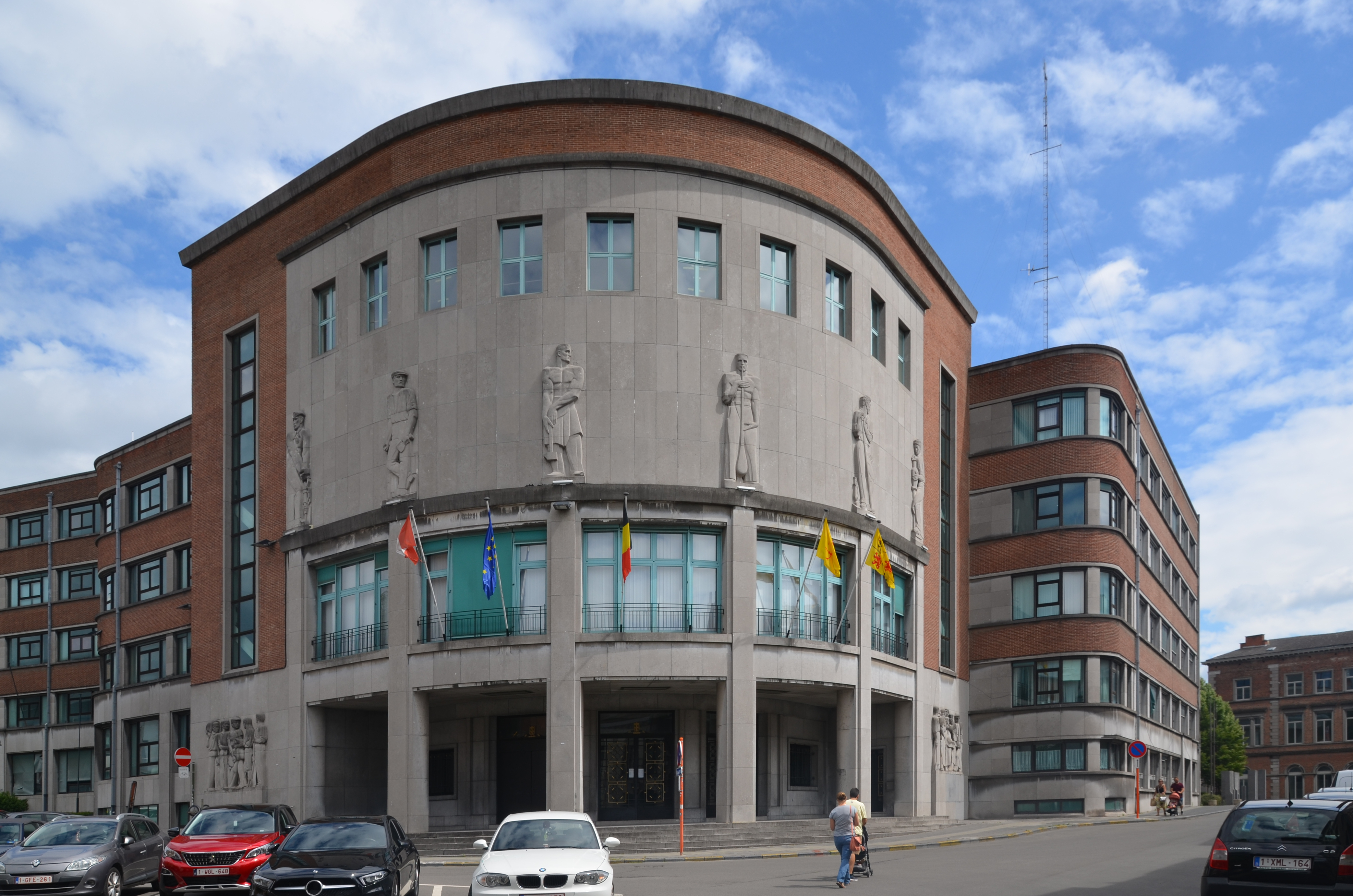 Mons (Belgique) - Palais provincial.